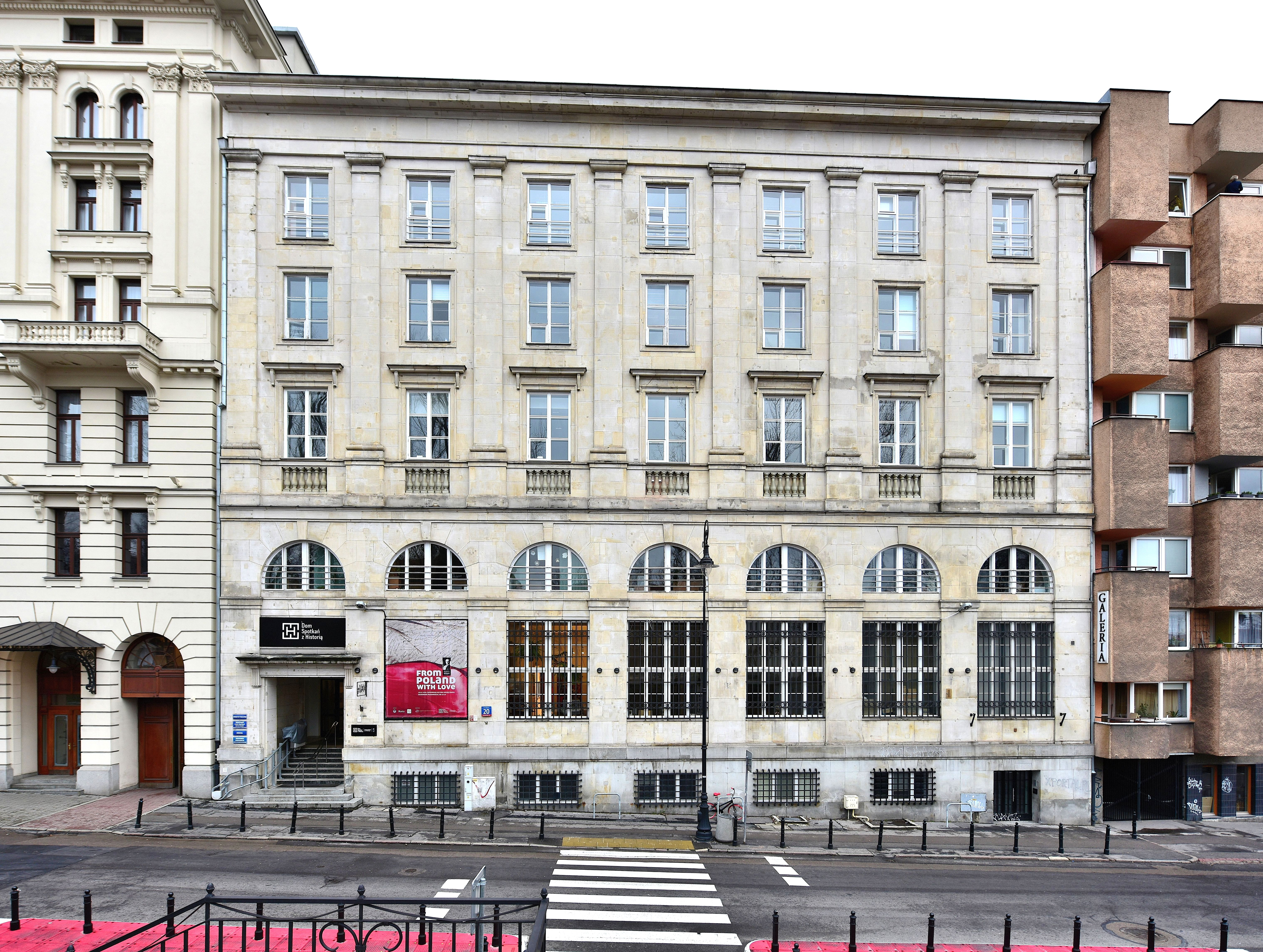 Budynek Banku Cukrownictwa przy ul. Karowej 20 w Warszawie